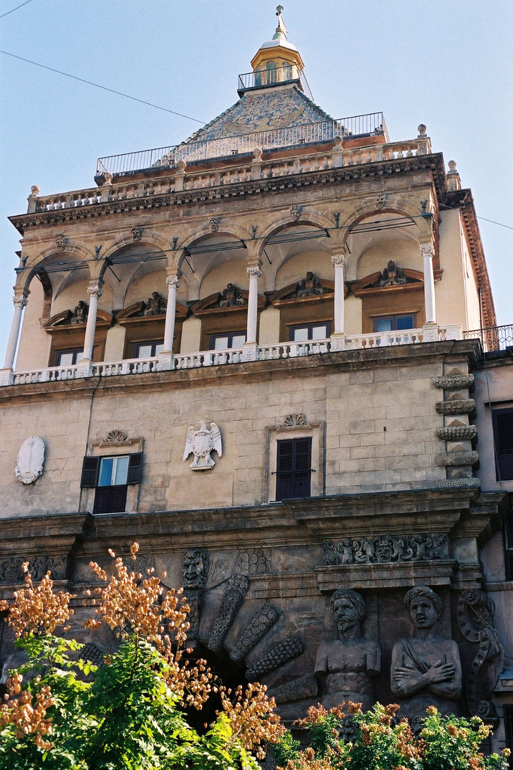 Porta Nuova, Palermo. General view